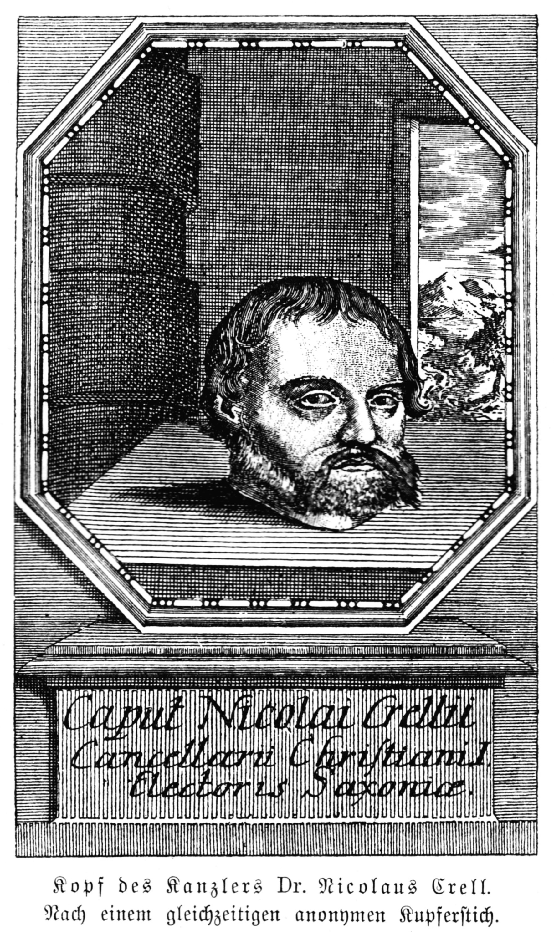 Kopf des Kanzlers Dr. Nicolaus Crell. Nach einem gleichzeitigen anonymen Kupferstich.